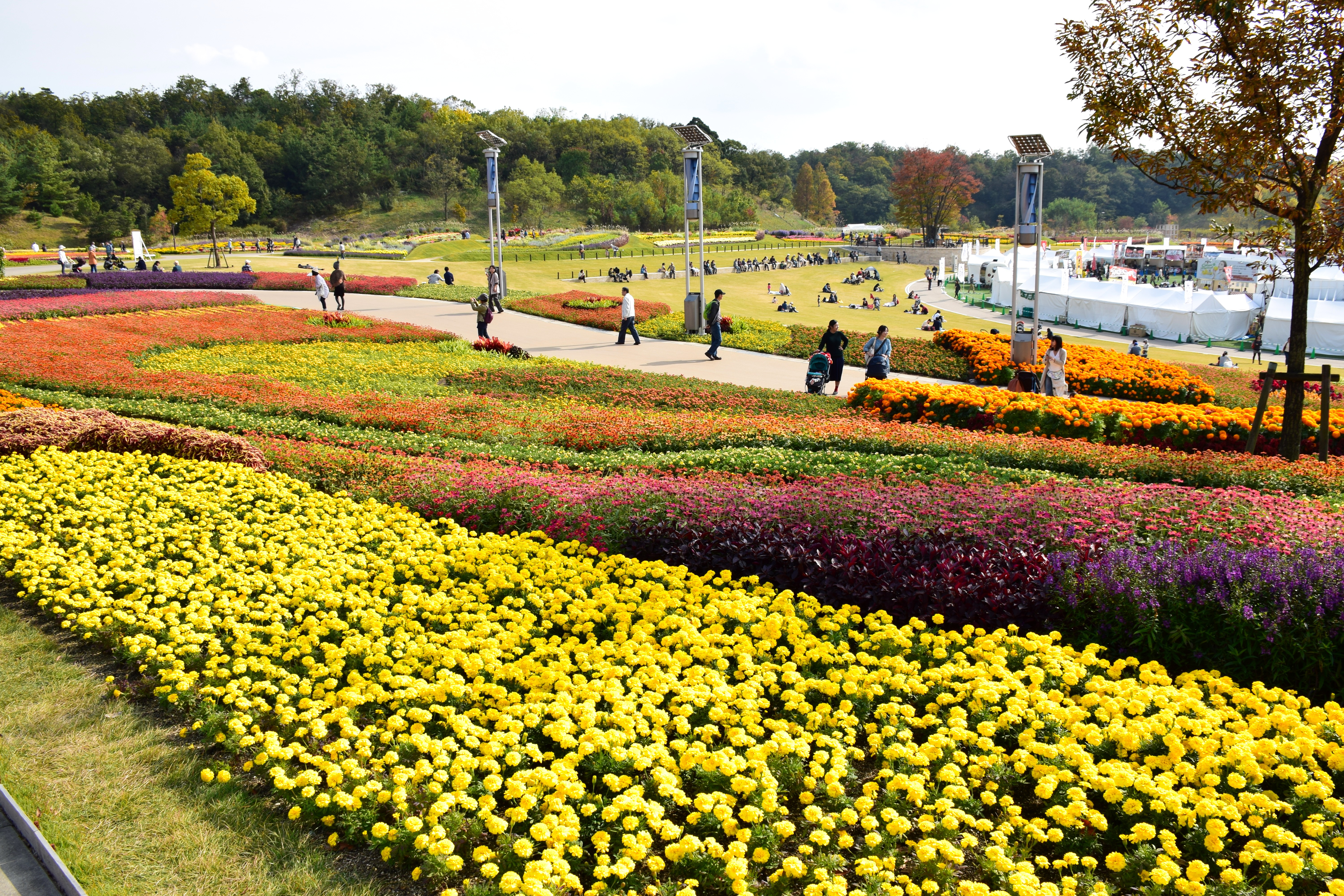 モリコロパーク